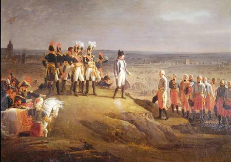 Napoleone riceve una delegazione di senatori, olio su tela, Musée de Versailles(search with the terms "Reddition d'Ulm" and check the box)